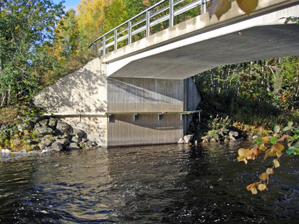 utterpassage i Gottne, Västernorrlands län